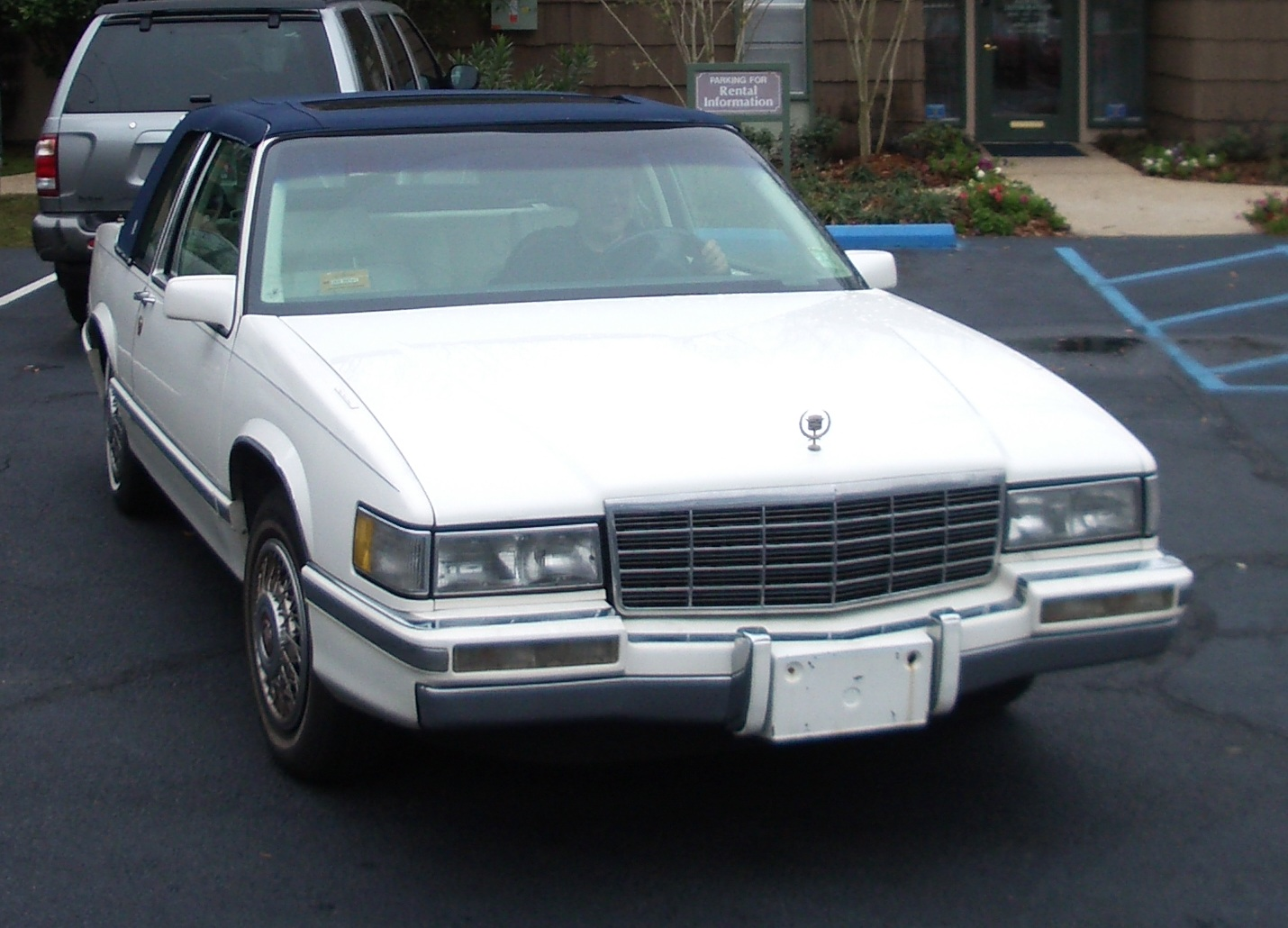 Cadillac Coupe De Ville Model 1991